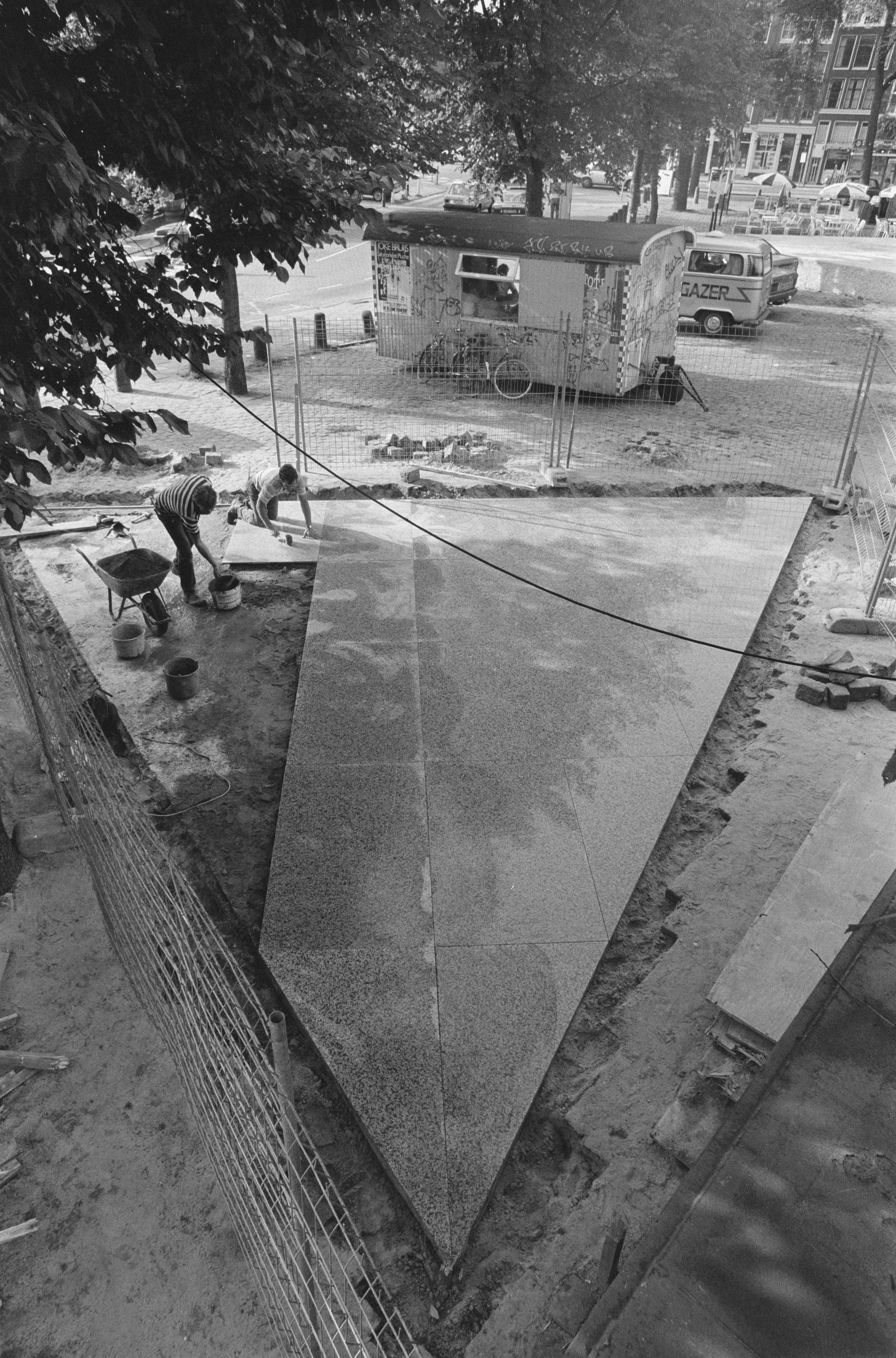 Collectie / Archief : Fotocollectie Anefo Reportage / Serie : [ onbekend ] Beschrijving : Bouw "Homo-monument" op Westermarkt Amsterdam Datum : 17 augustus 1987 Locatie : Amsterdam, Noord-Holland Trefwoorden : monumenten Persoonsnaam : Westermarkt Fotograaf : Bogaerts, Rob / Anefo, [onbekend] Auteursrechthebbende : Nationaal Archief Materiaalsoort : Negatief (zwart/wit) Nummer archiefinventaris : bekijk toegang 2.24.01.05 Bestanddeelnummer : 934-0517